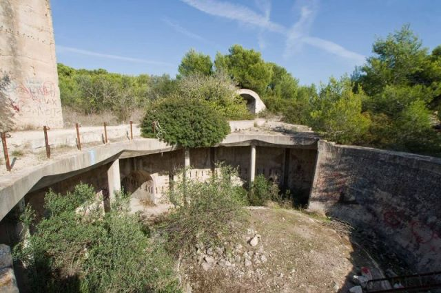 Alloggio del cannon 305/42